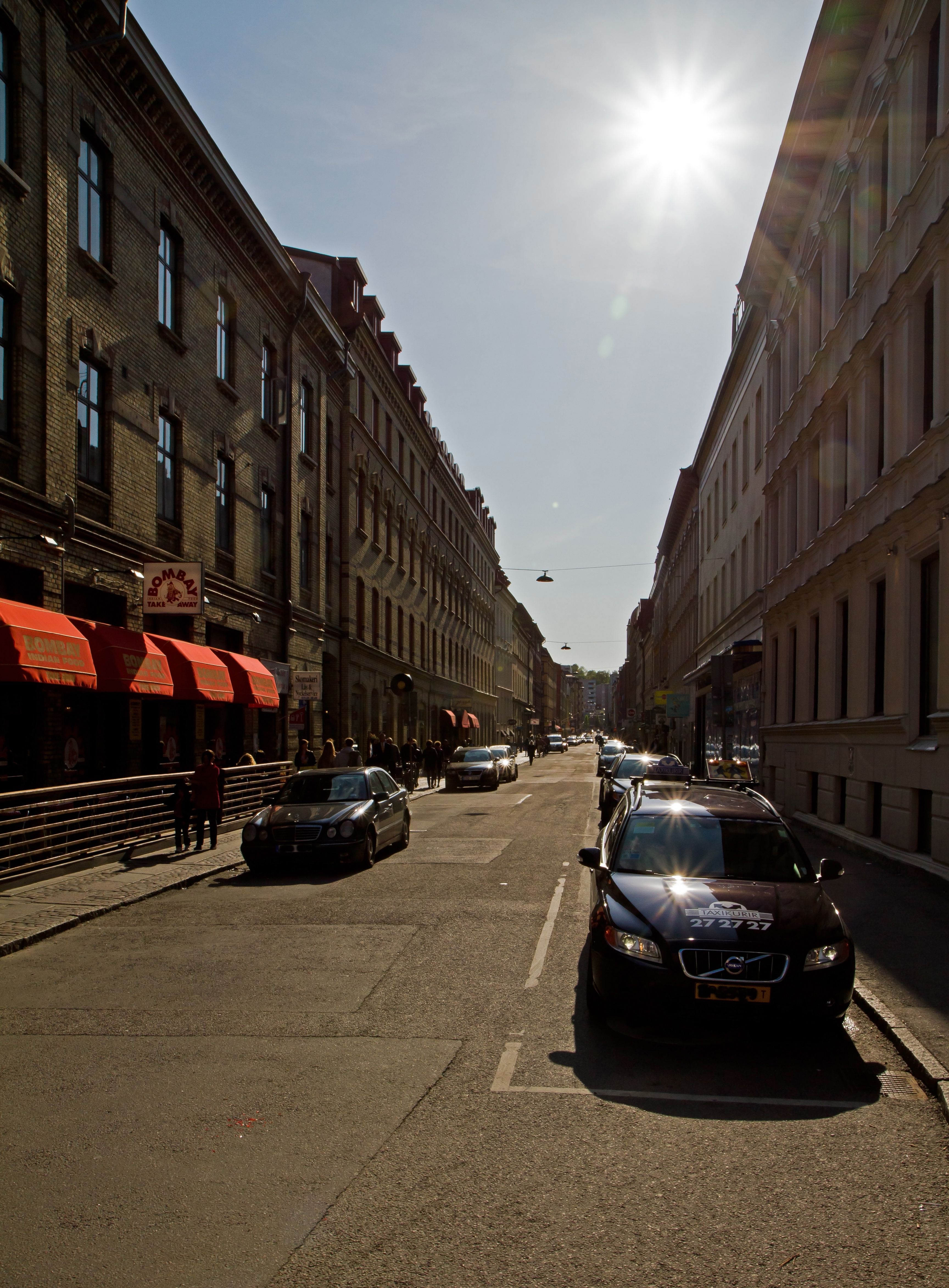 Andra Långgatan, Maj 2011